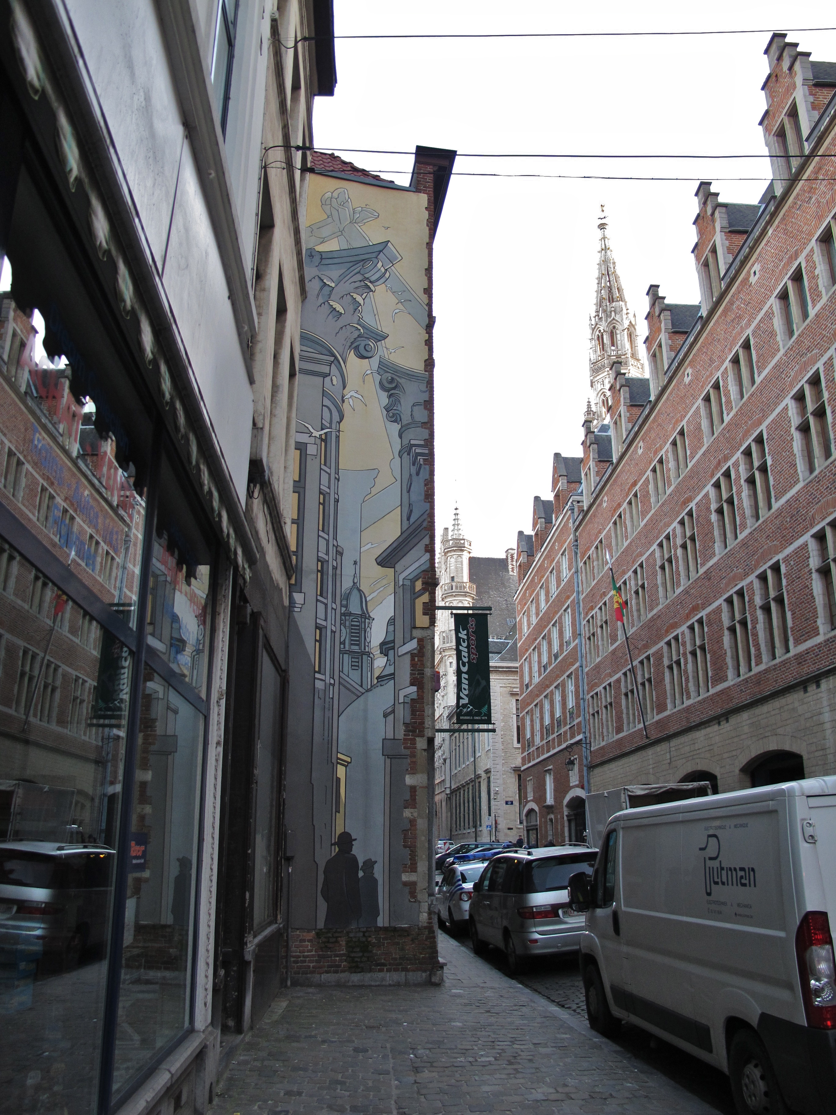 Stripmuur De Doorgang te Brussel